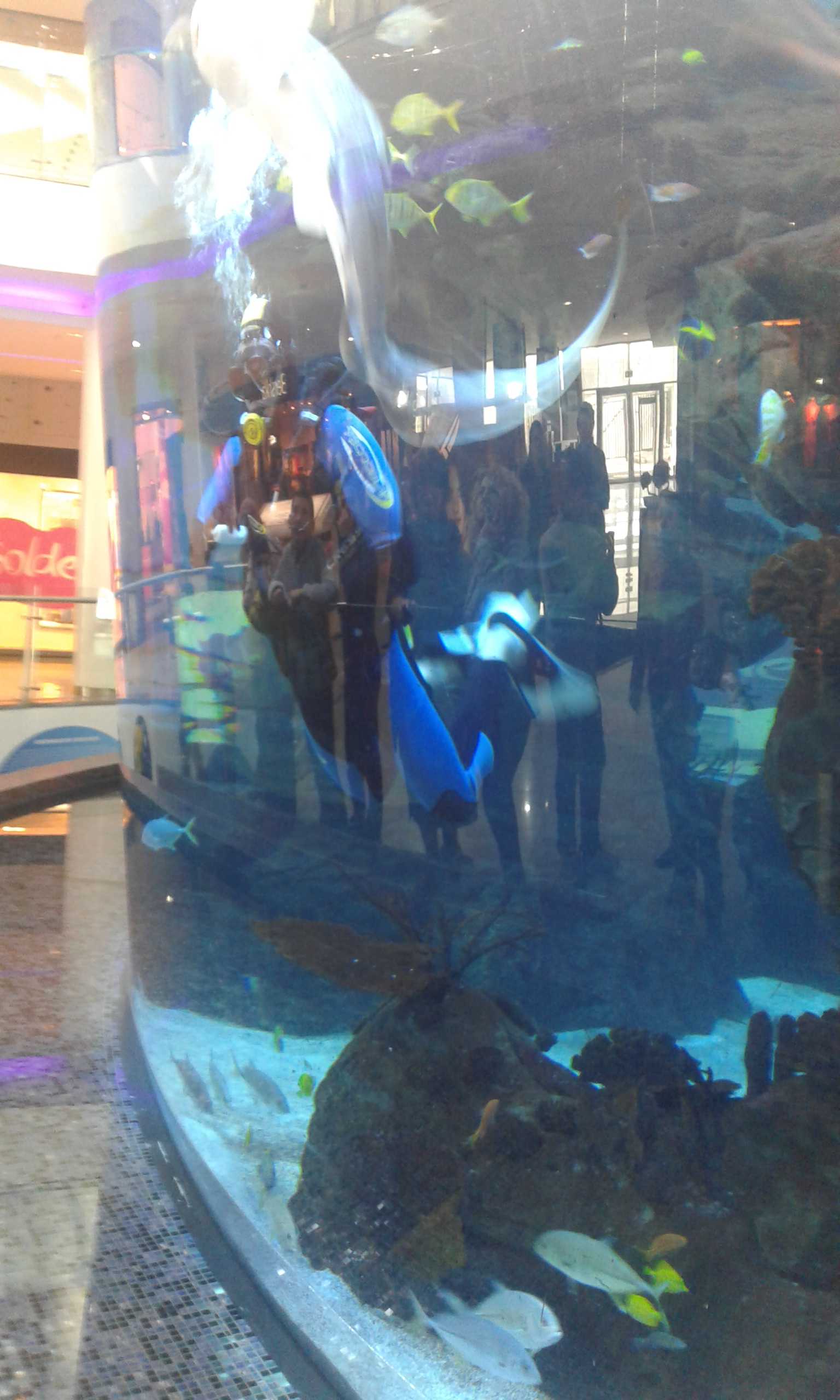 ماروكو مول morocco mol مسبح مرئي أسماك poisson fish said el jamali من تصوير سعيد الجمالي للتواصل معي